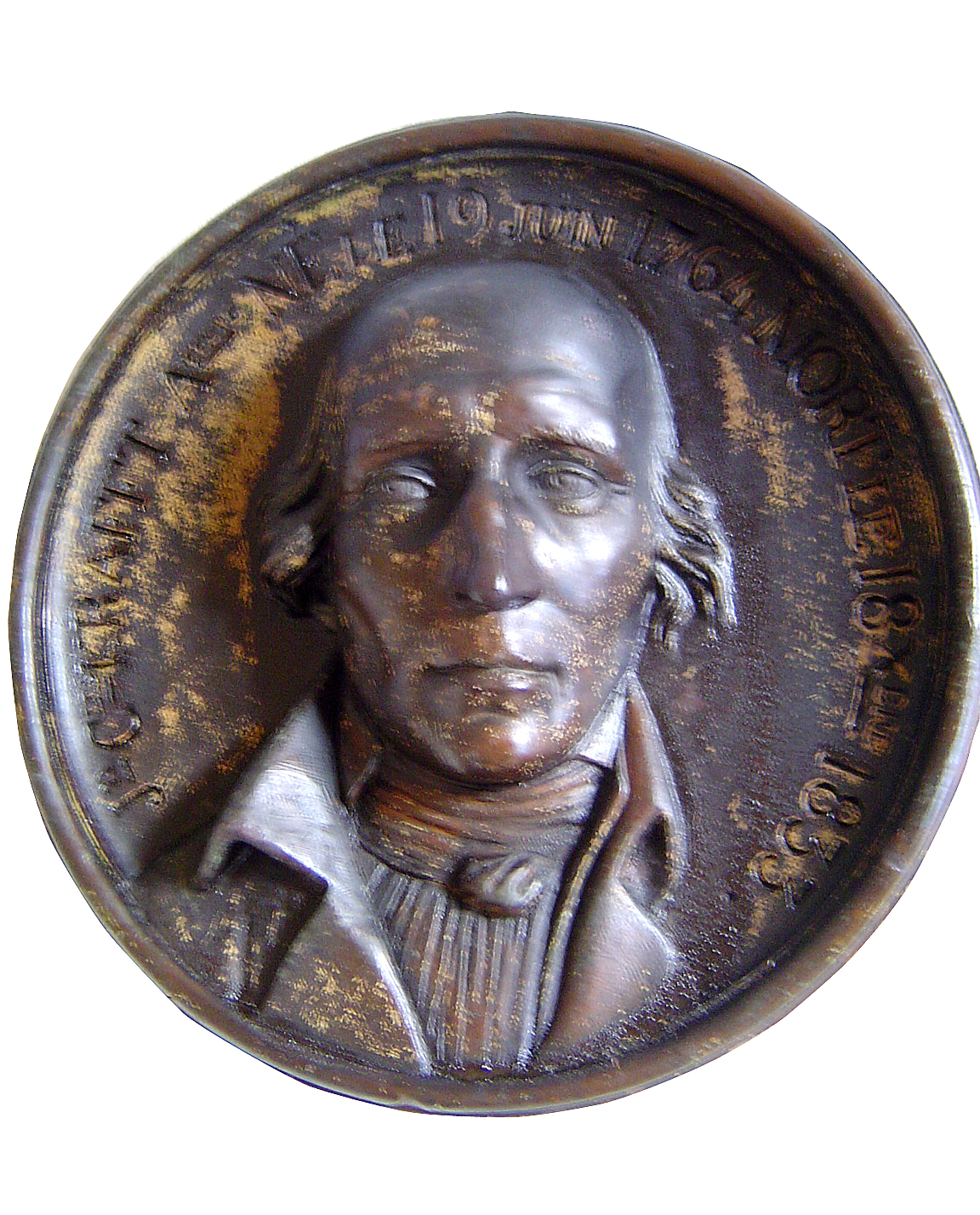 Masque mortuaire de Jean-Charles Krafft restauré par Jean-François Lamige, Ecole des Beaux-Arts, Bordeaux